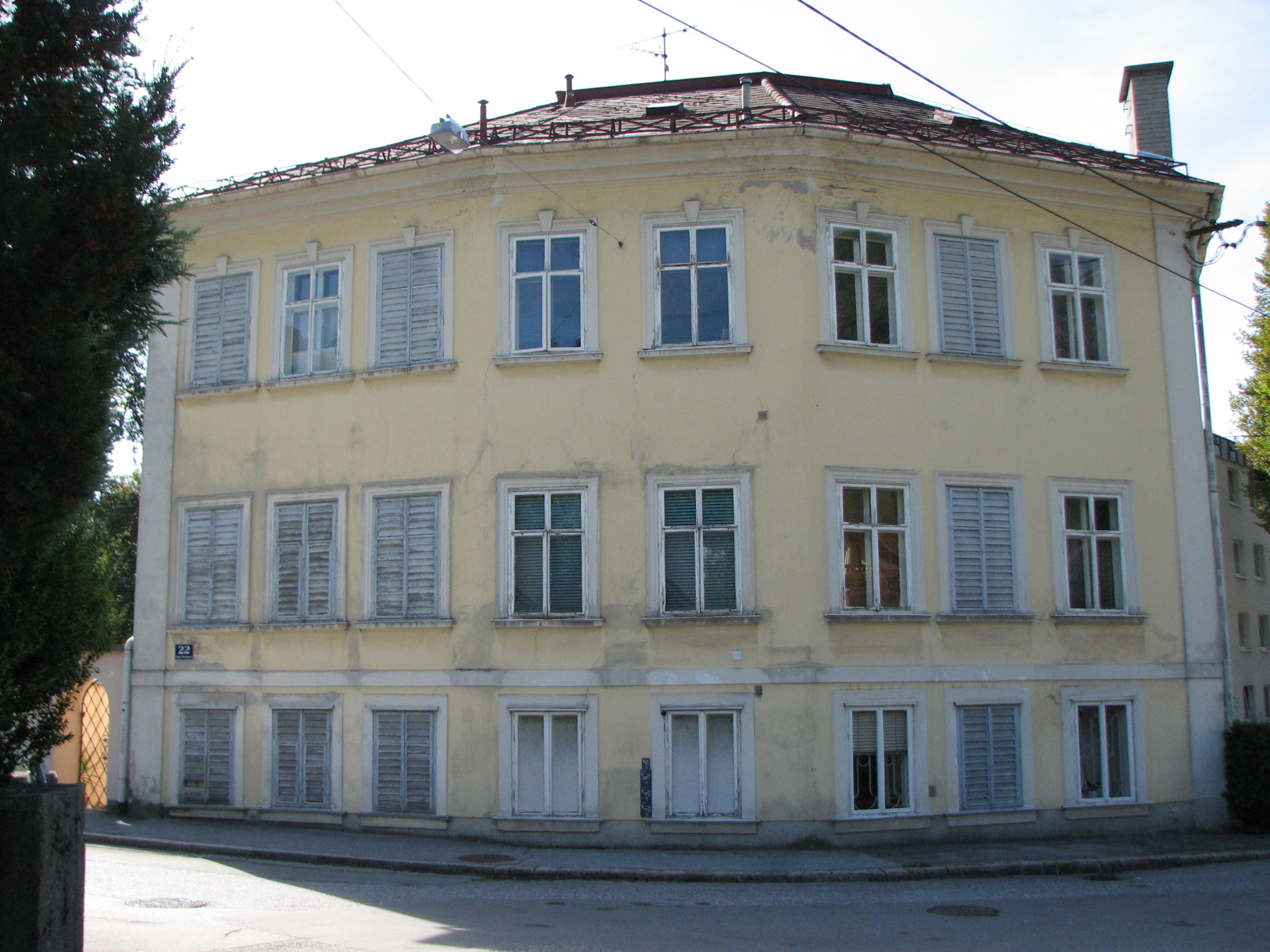 Schloss Minnesheim